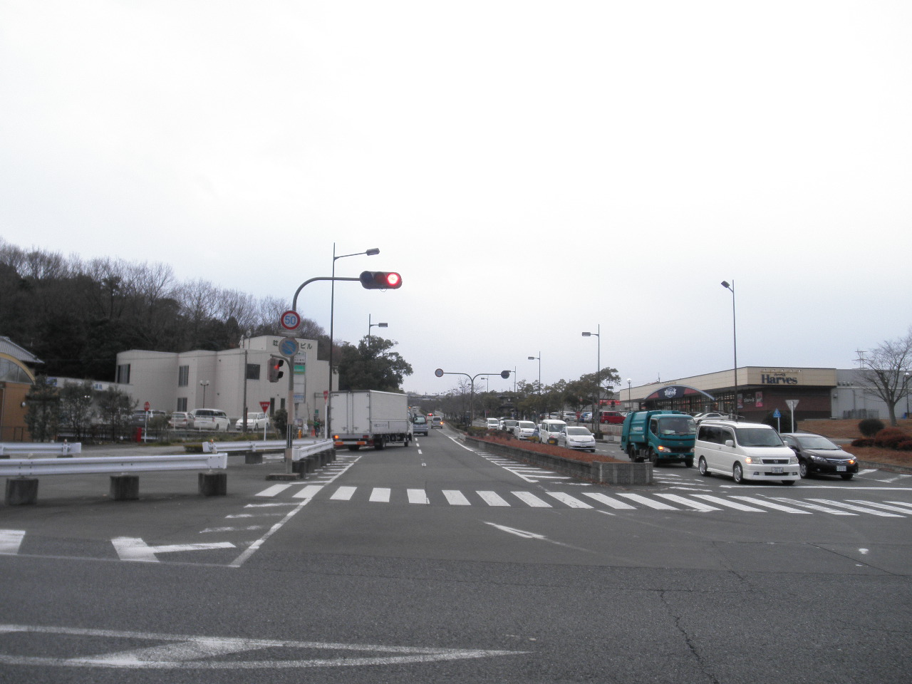 京都府木津川市木津川台1丁目 京都府道326号けいはんな記念公園線